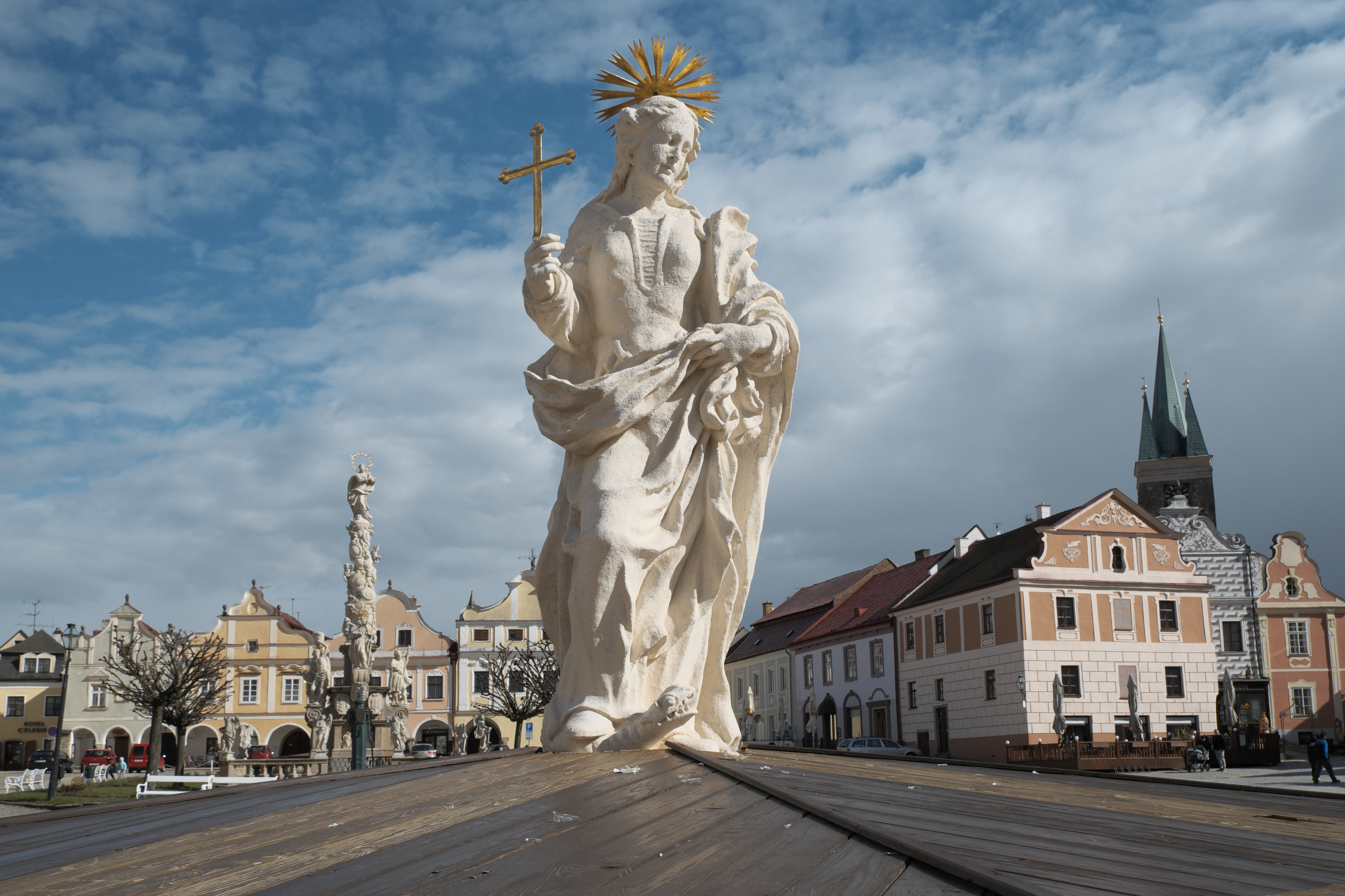 Margaretenbrunnen in Telč im Okres Jihlava in der Region Hochland (Kraj Vysočina, Tschechien)